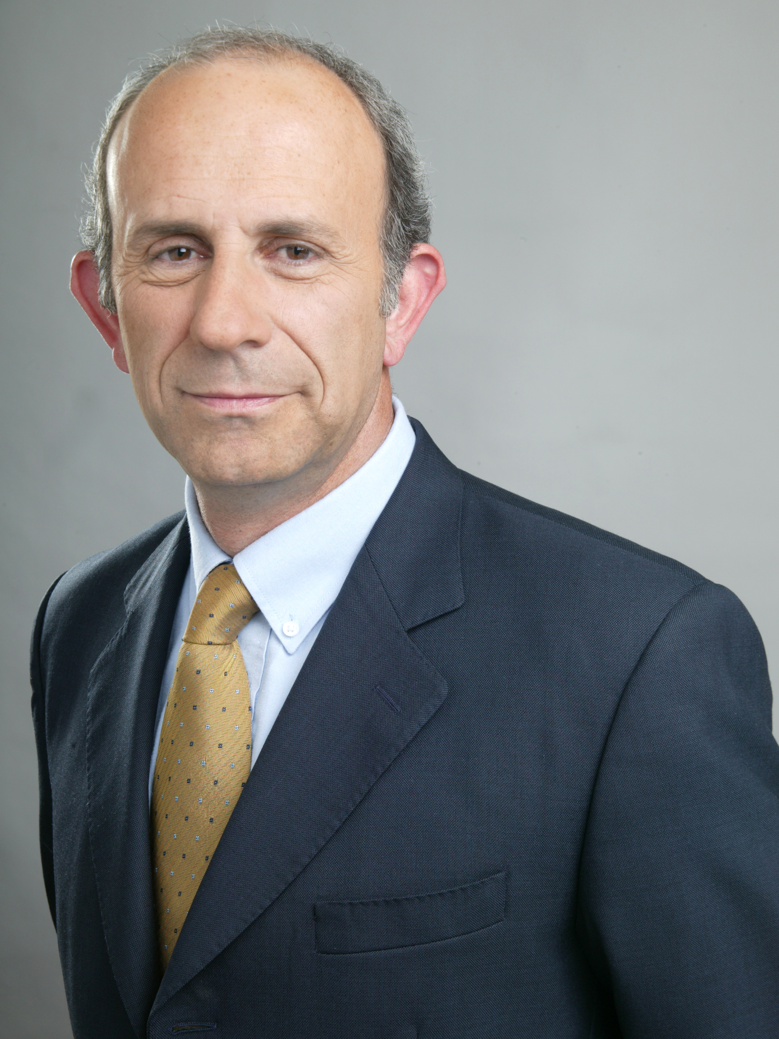 José Galilea, político chileno.